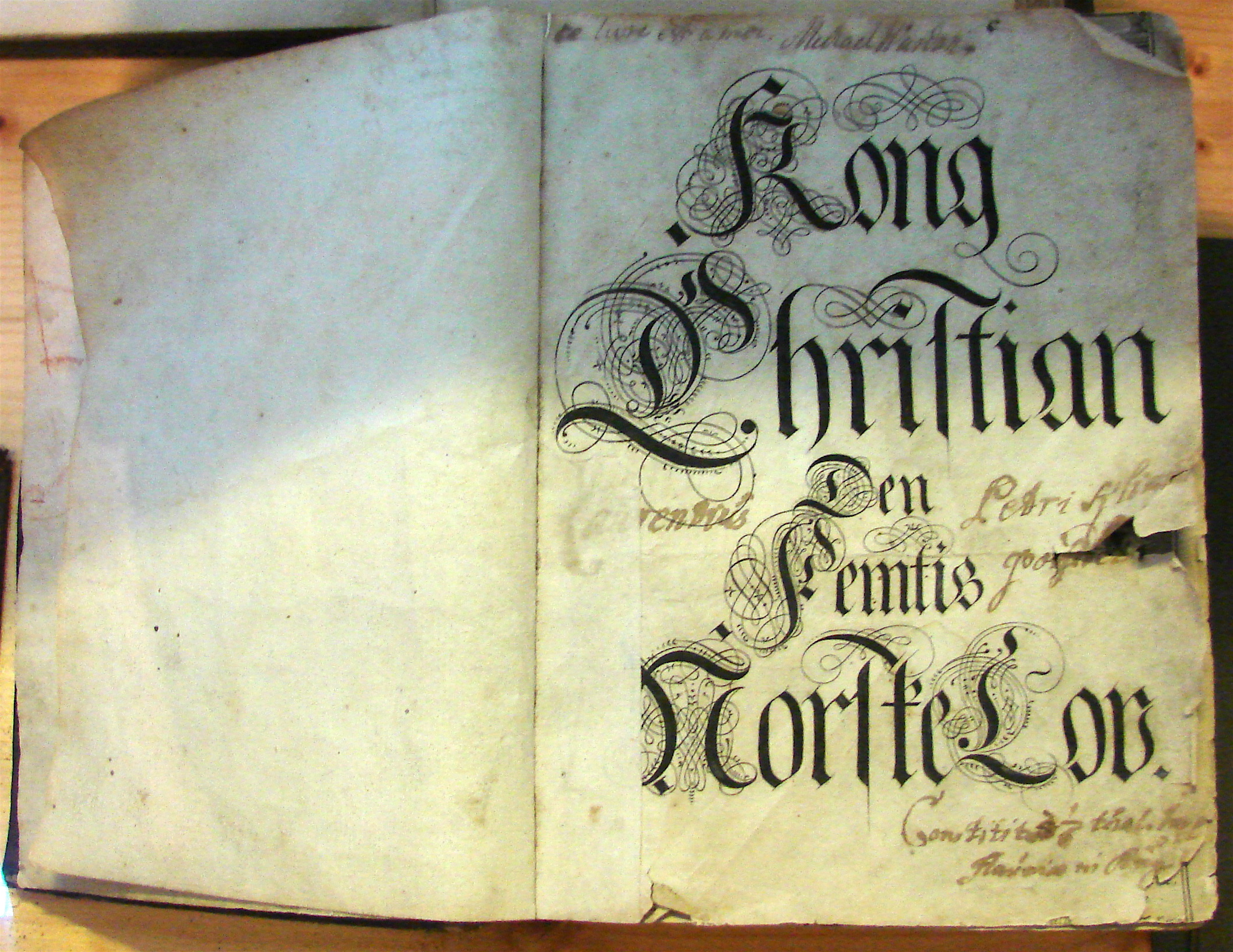 Kong Christian V's Norske Lov, Stavern Kirke, Vestfold